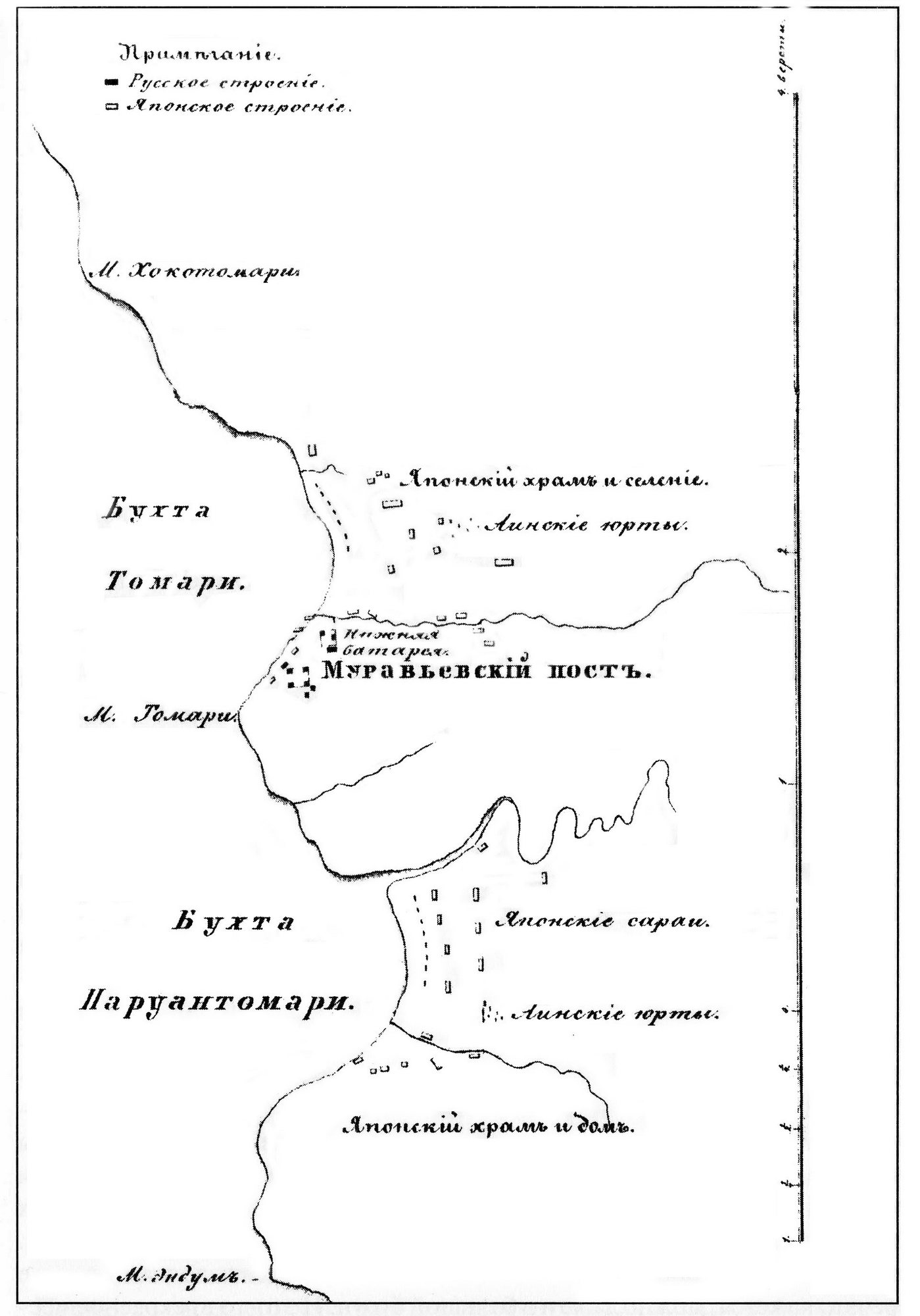 Карта поста Муравьёвского и прилегающей территории (сейчас г.Корсаков в Сахалинской области)